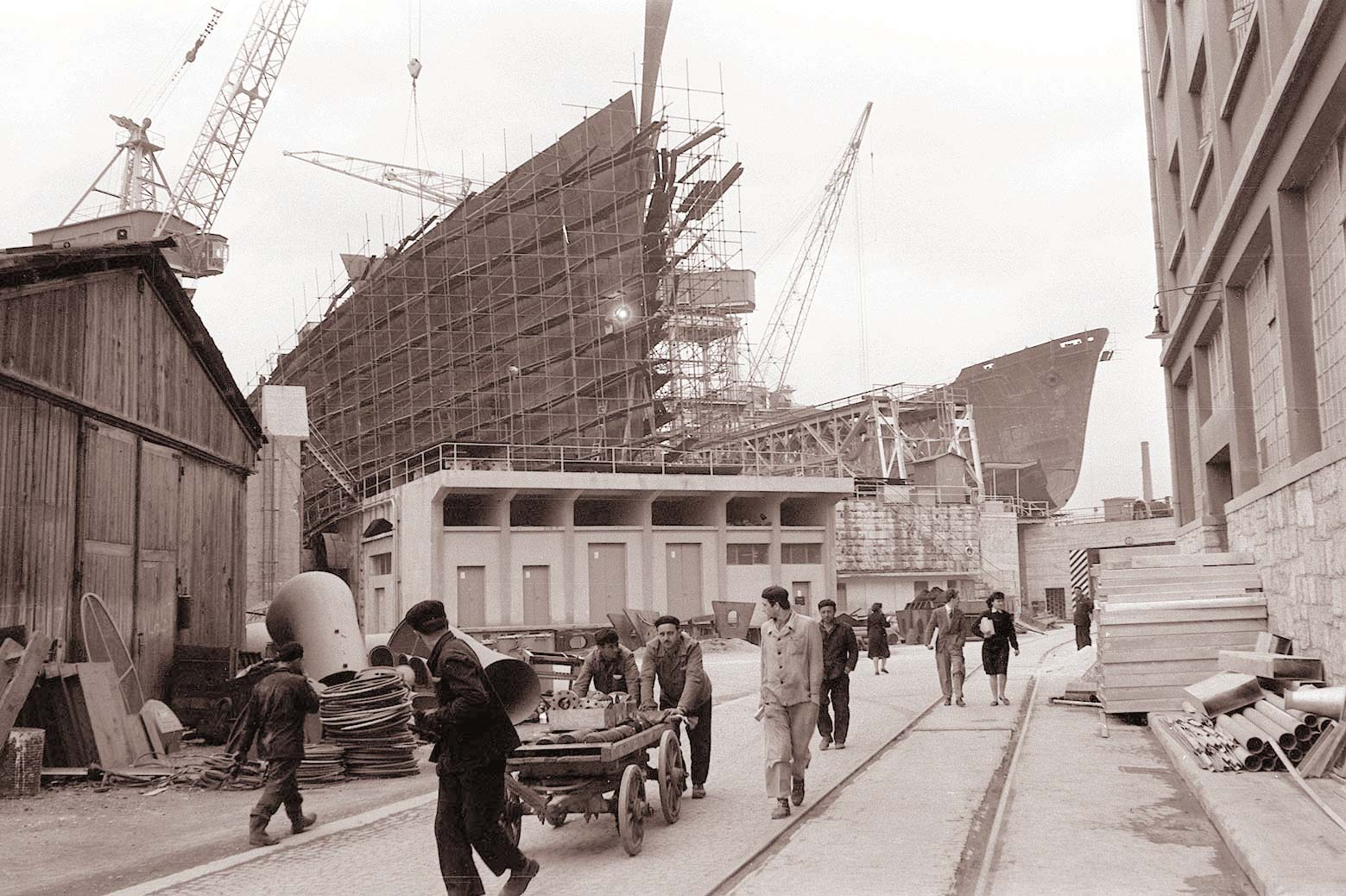 Ladjedelnica 3. maj Rijeka